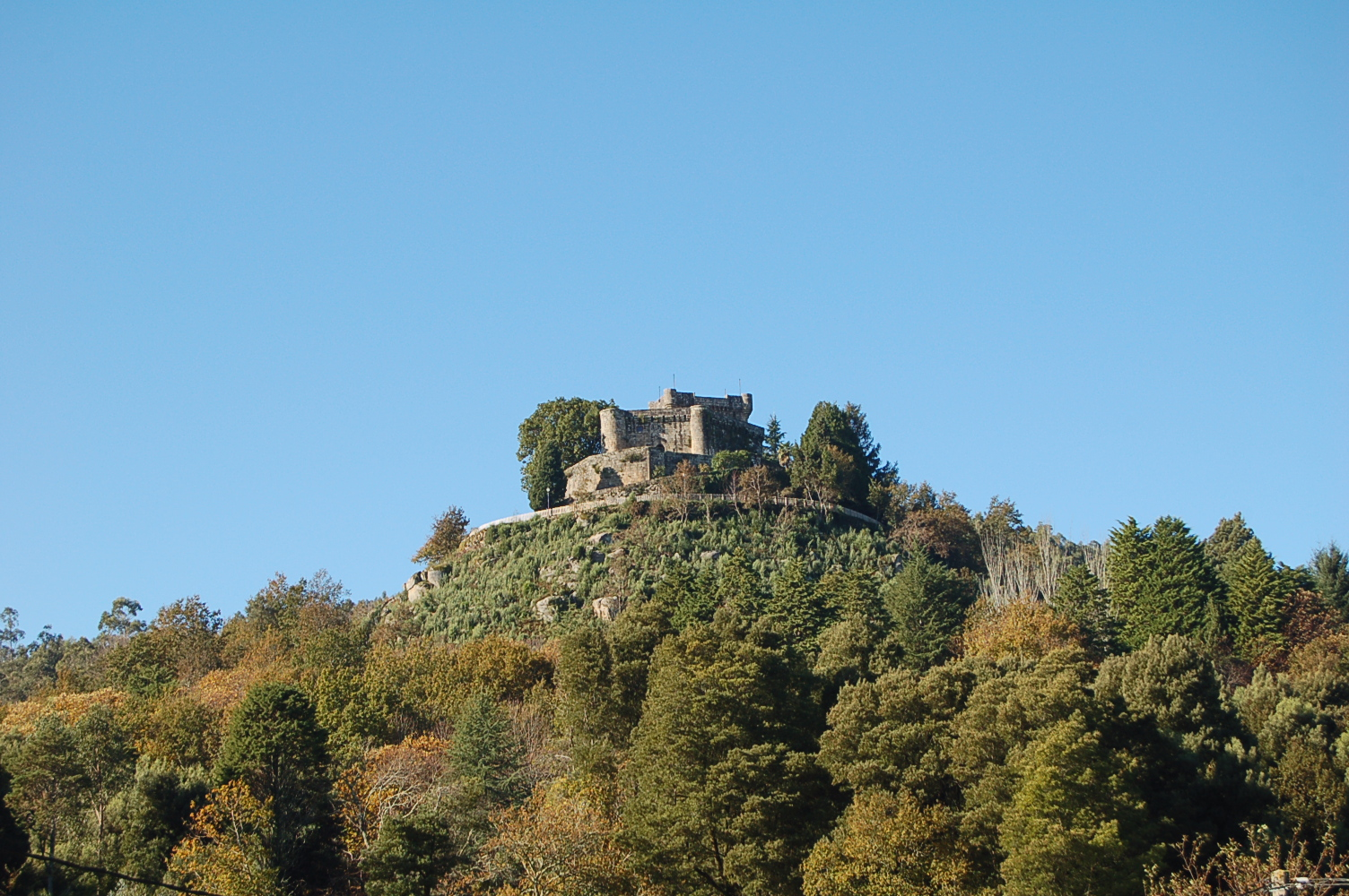 Castelo de Sobroso, Mondariz-Ponteareas